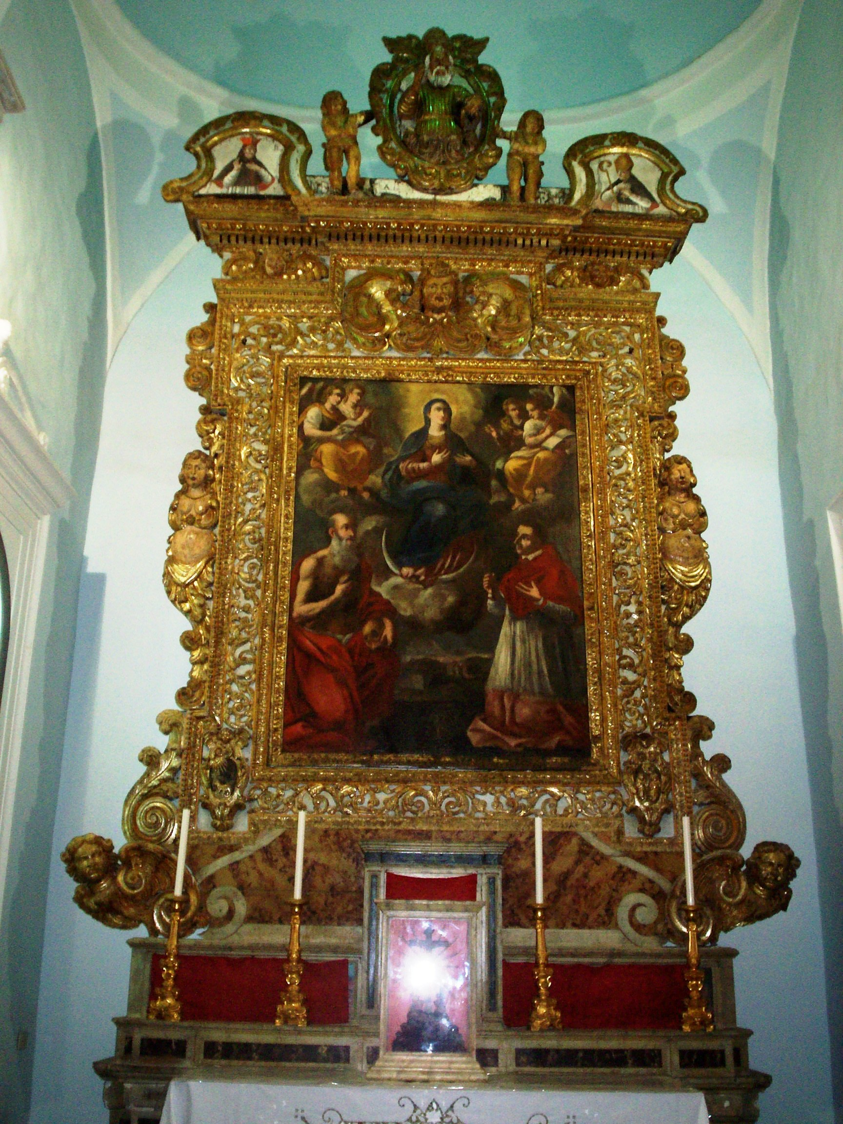 Pala di Santa Maria del Pianto (XVII sec.) della Chiesa di Sant'Antonio in Cerreto Sannita (Bn)